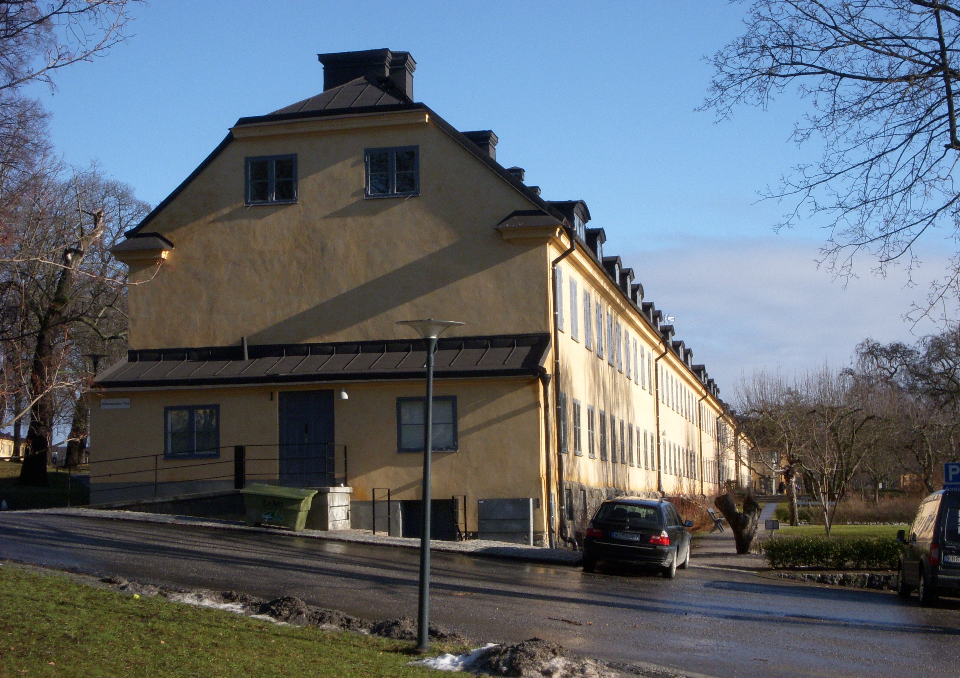 Långa raden på Skeppsholmen (Västra bostället)